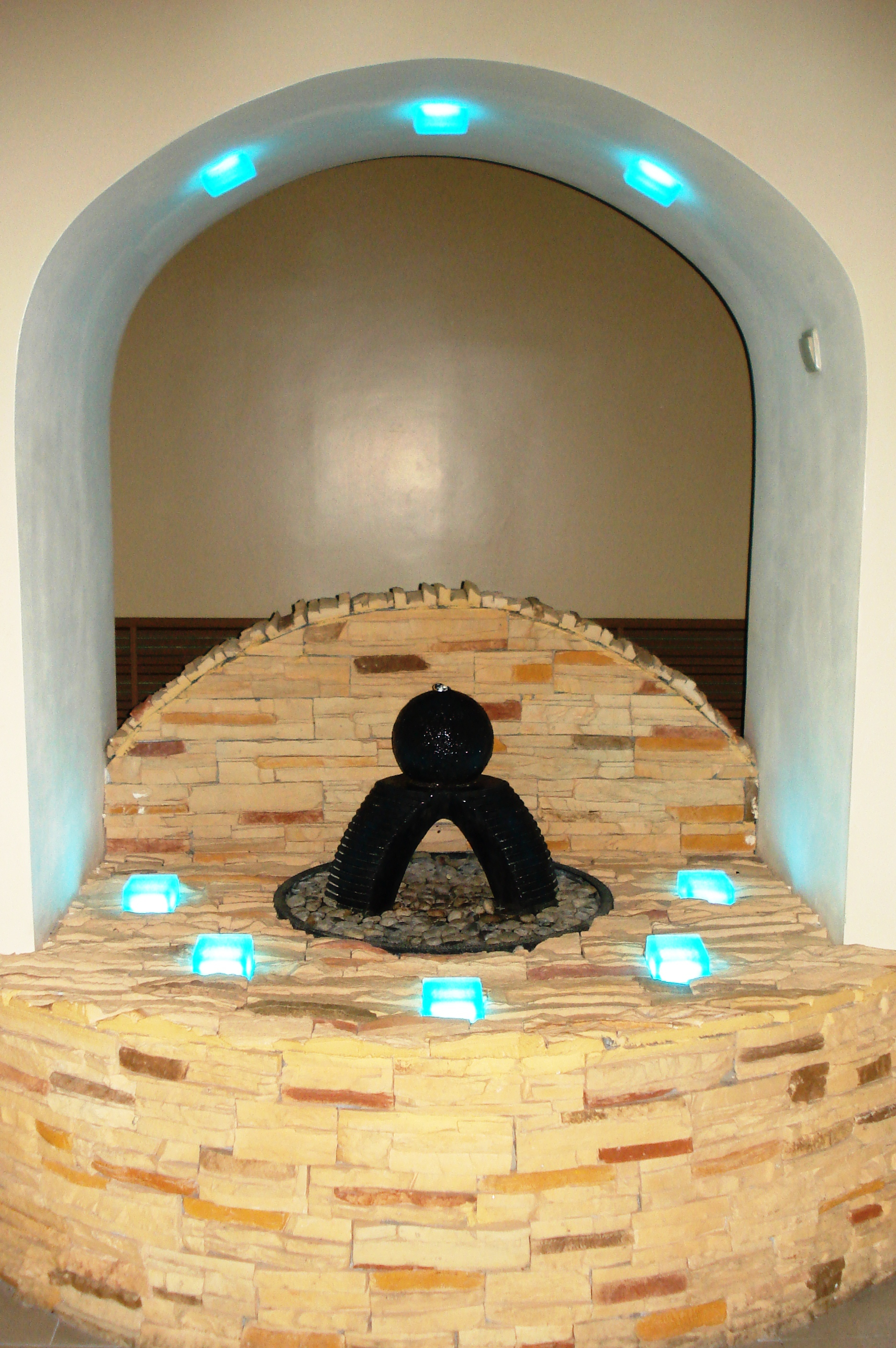 Фонтан в гимназии имени А.В.Кольцова в Воронеже